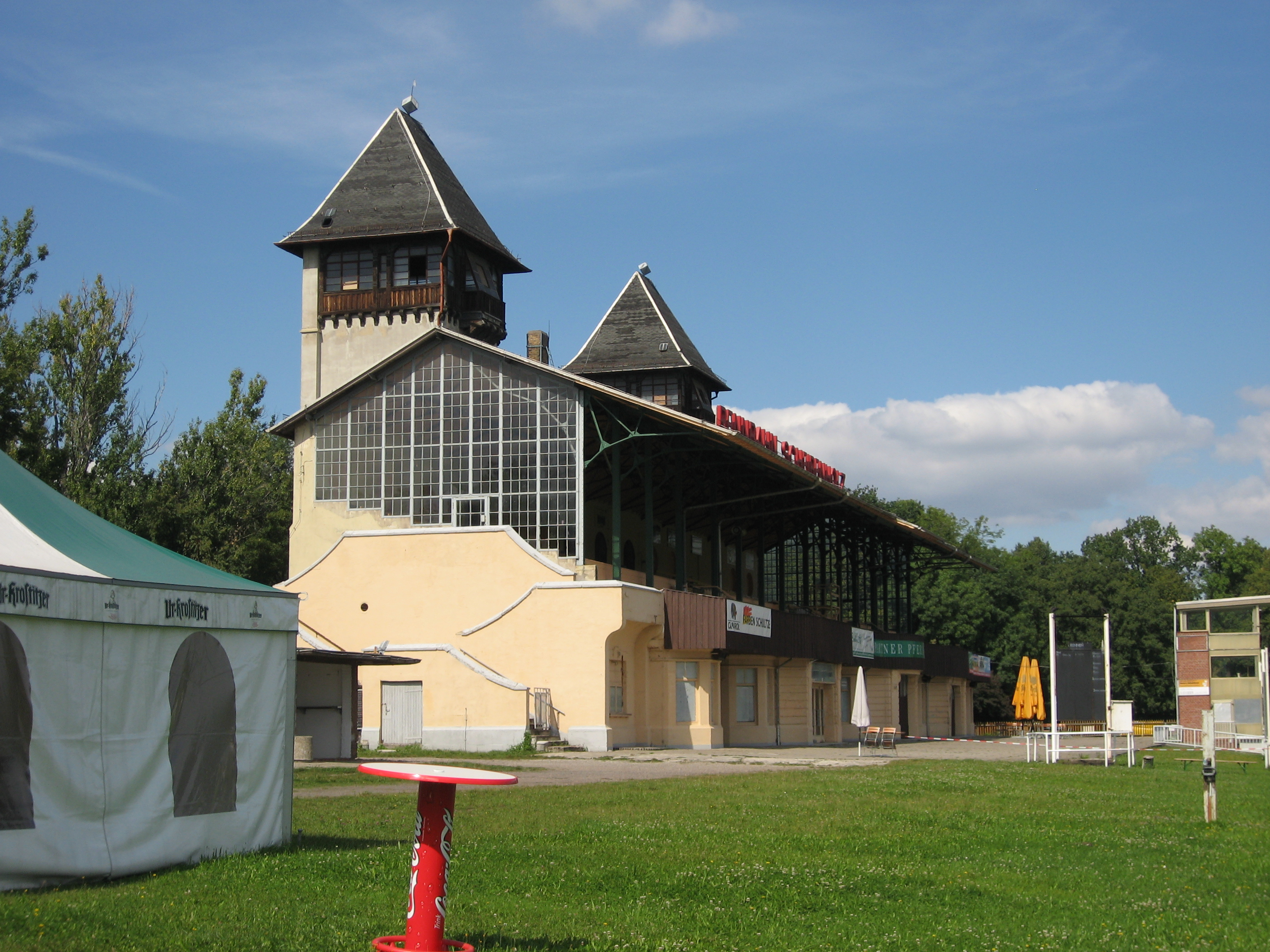 Leipzig, Galopprennbahn Scheibenholz, Tribünengebäude, erbaut von Otto Paul Burghardt (Eröffnung am 25. Mai 1907)